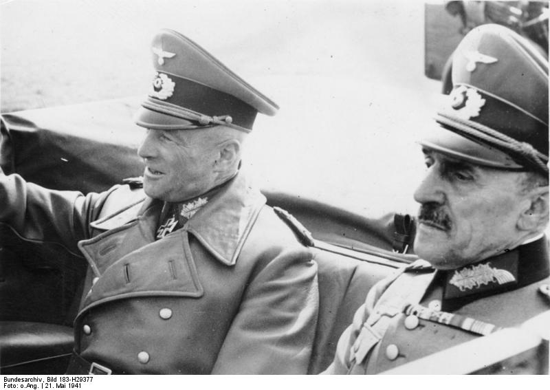 Paris, Walther v. Brauchitsch, Otto v. Stülpnagel Zentralbild II. Weltkrieg 1939-45 Der Oberbefehlshaber des Heeres, Generalfeldmarschall Walter von Brauchitsch trifft am 21.5.1941 auf dem Luftwege in Paris ein. Er wird von dem Militärbefehlshaber in Frankreich, General der Infanterie Otto von Stülpnagel, vom Flughafen abgeholt. UBz: die beiden im Kraftwagen auf der Fahrt in die Stadt. 54551-41 Abgebildete Personen: Brauchitsch, Walther von: Generalfeldmarschall, Oberbefehlshaber des Heeres, Deutschland (GND 116414855) Stülpnagel, Otto von: General, Luftkriegsakademie, Militärbefehlshaber Frankreich, Deutschland (GND 130044814)